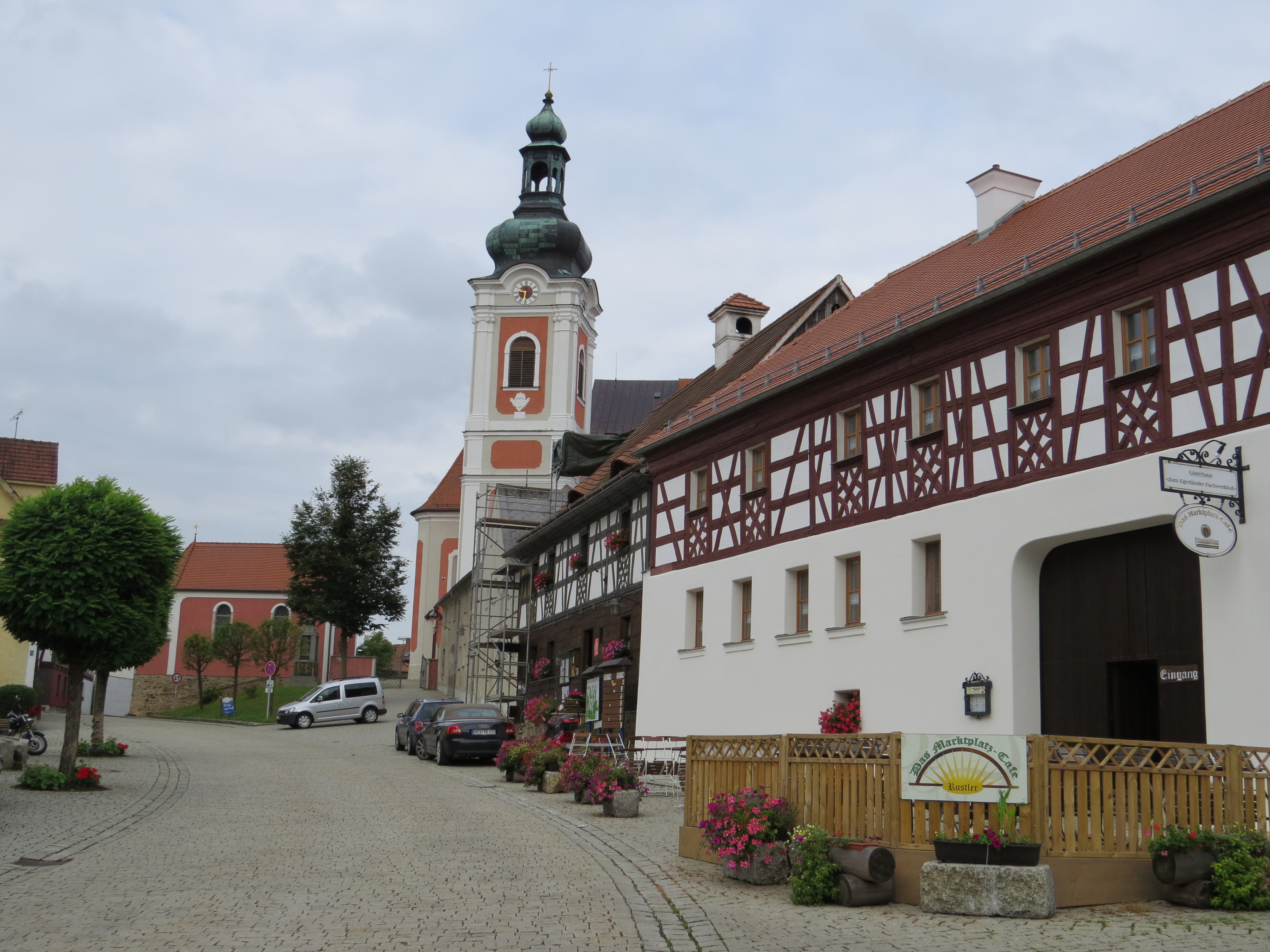 Marktplatz 8 und 10 in Neualbenreuth